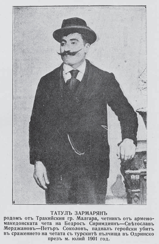 Tatul Zarmaryan from Malgara (present-day Malkara), died in 1901